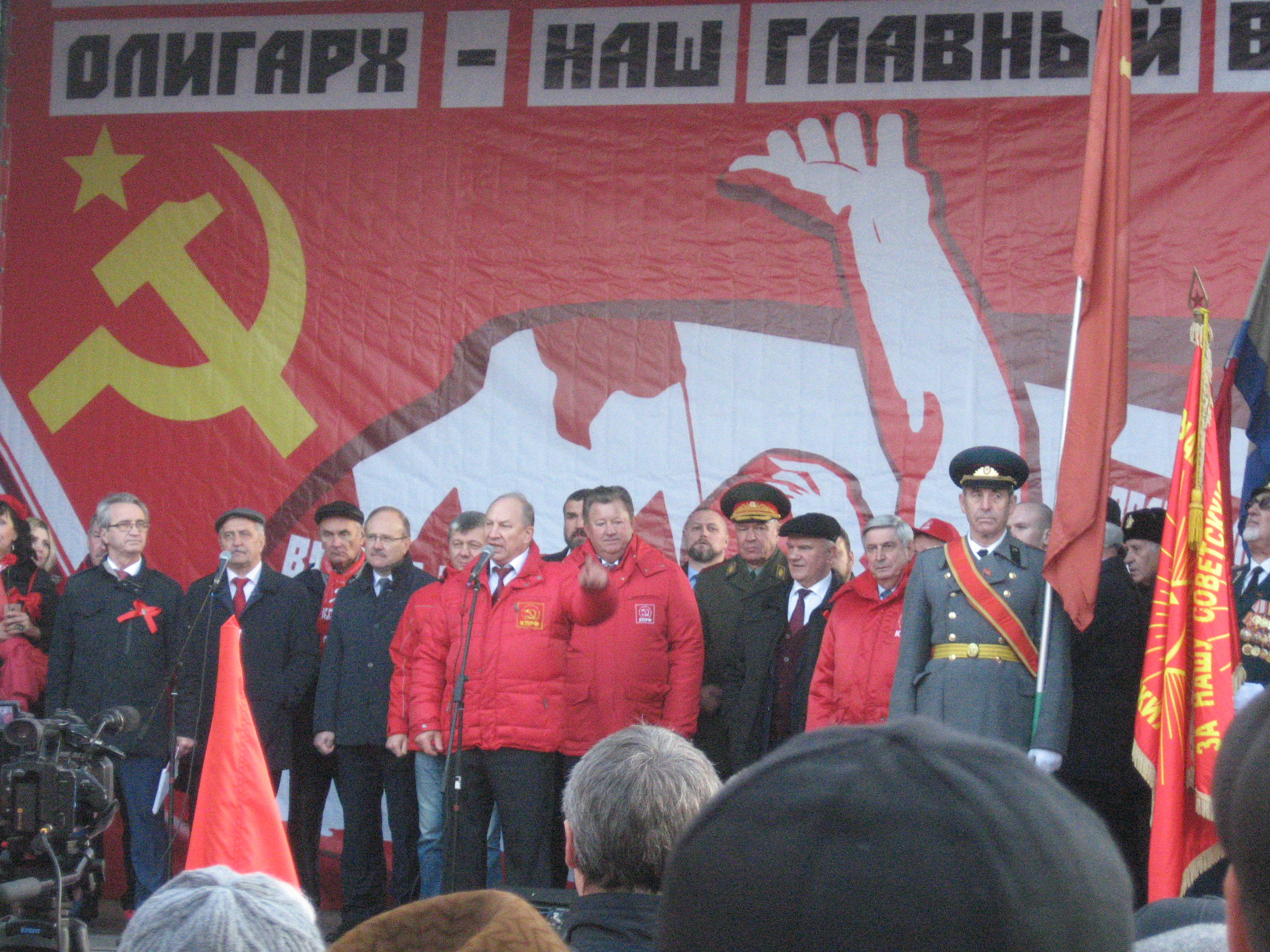 Митинг 7 ноября 2018 г в Москве. выступает Валерий Рашкин.